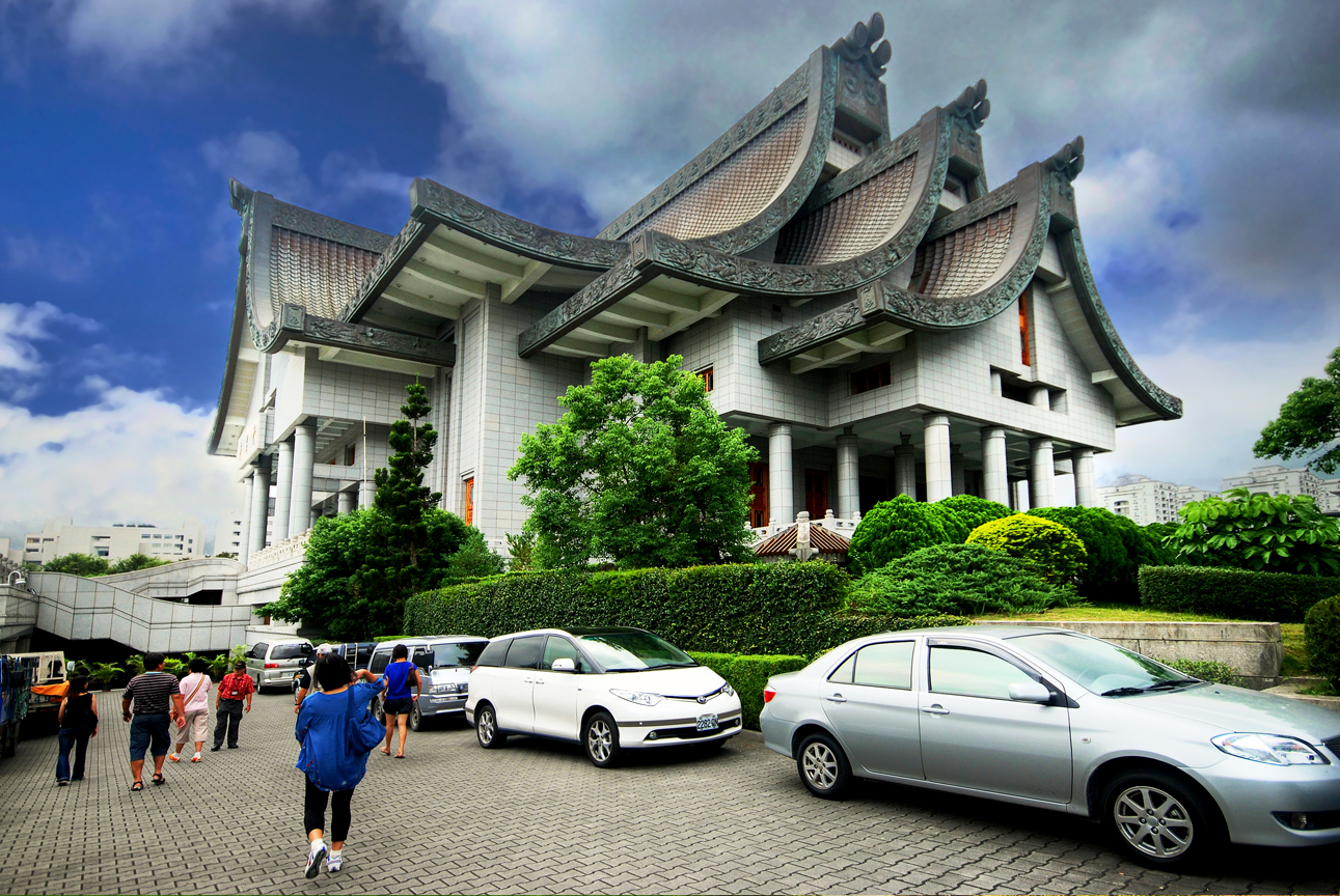 慈濟花蓮靜思堂，位於花蓮縣花蓮市。